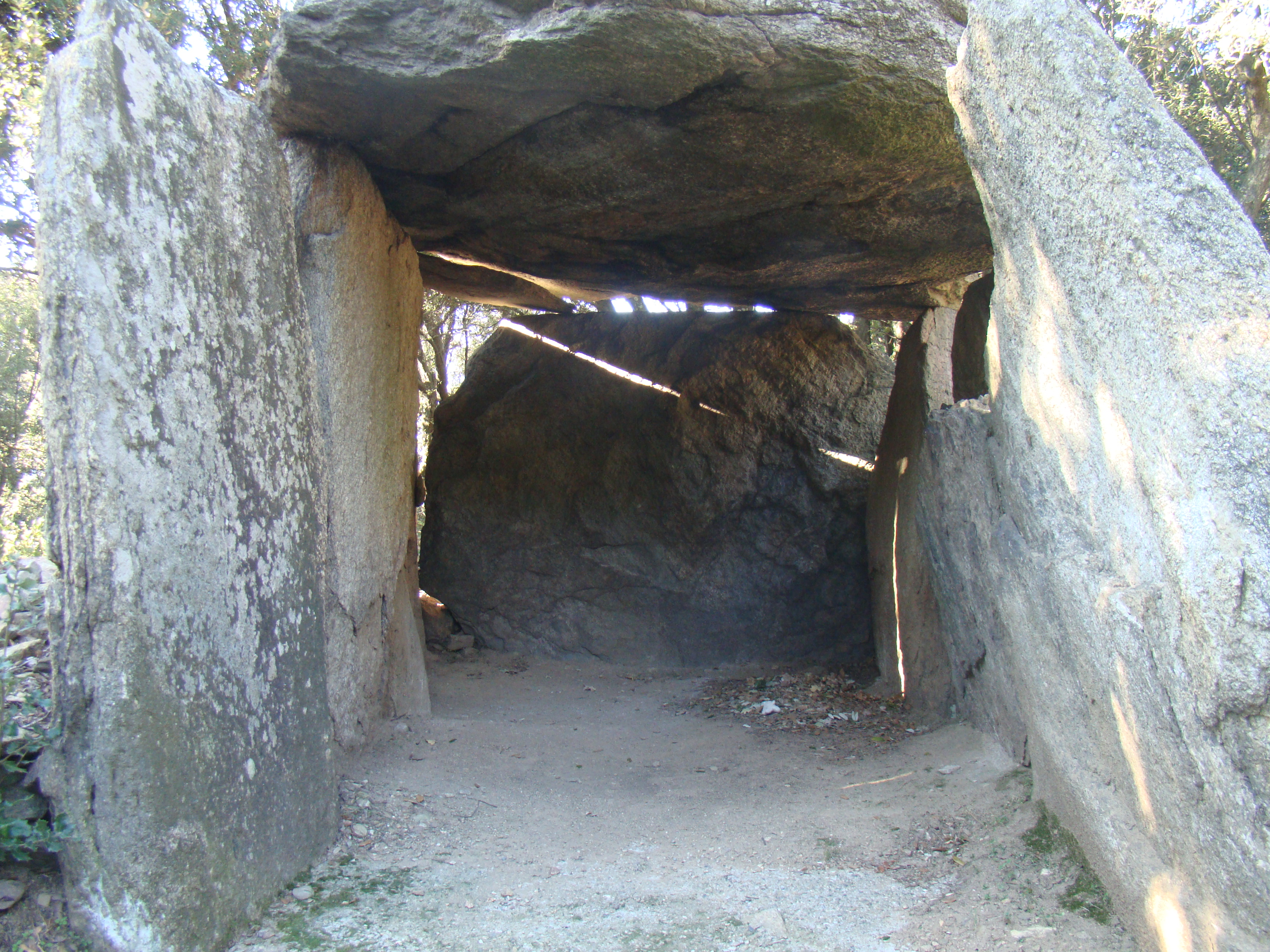 Vue de l'intérieur du dolmen de Balma de Na Cristiana